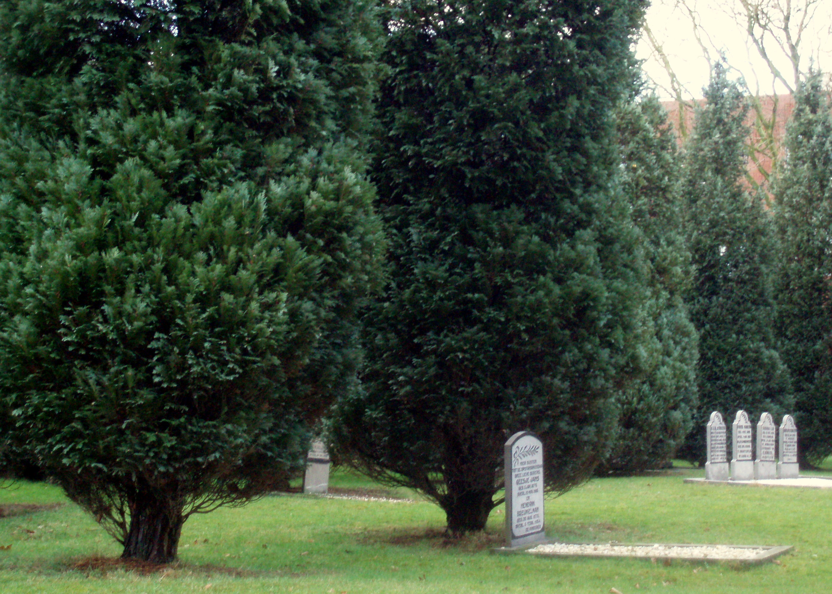 Oorlogsgraven op Kerkhof Nijenstede in Hardenberg.